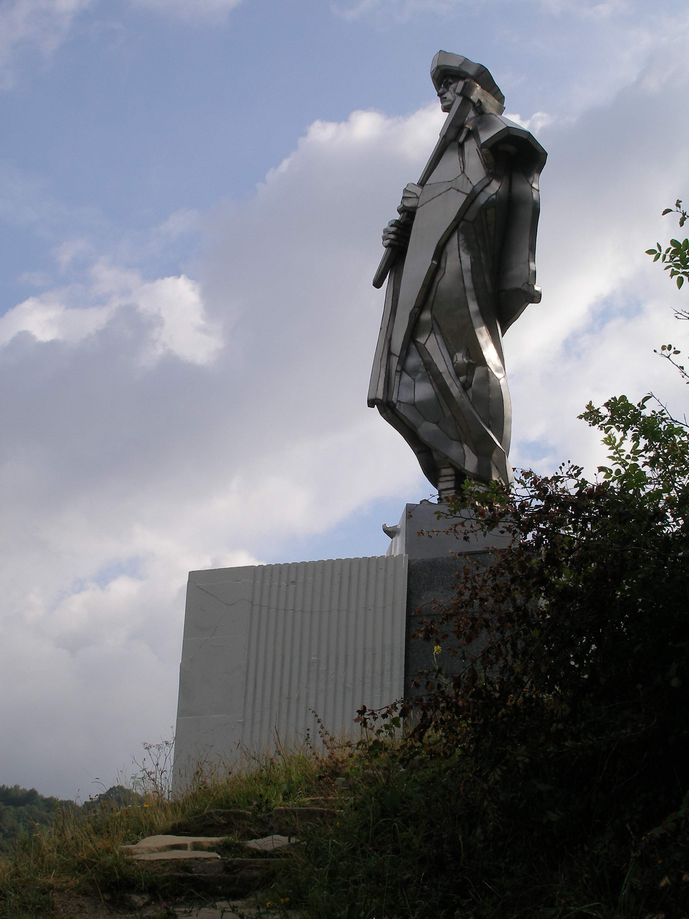 Rázovitá slovenská obec Terchová,návršie s monumentálnou sochou ľudového slovenského hrdinu Juraja Jánošíka. Autor monumentu J.Kulich rok 1988.